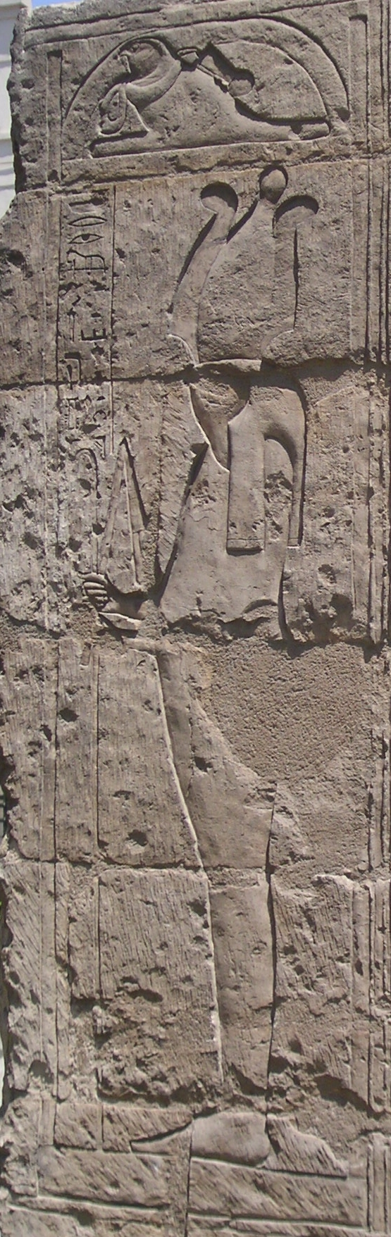 Relief représentant le dieu Sokaris - Chapelle du grand prêtre de Ptah Sheshonq, fils d'Osorkon II - XXIIe dynastie égyptienne - Jardin du Musée du Caire